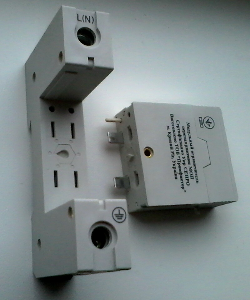 Знято мобілкою Самсунг